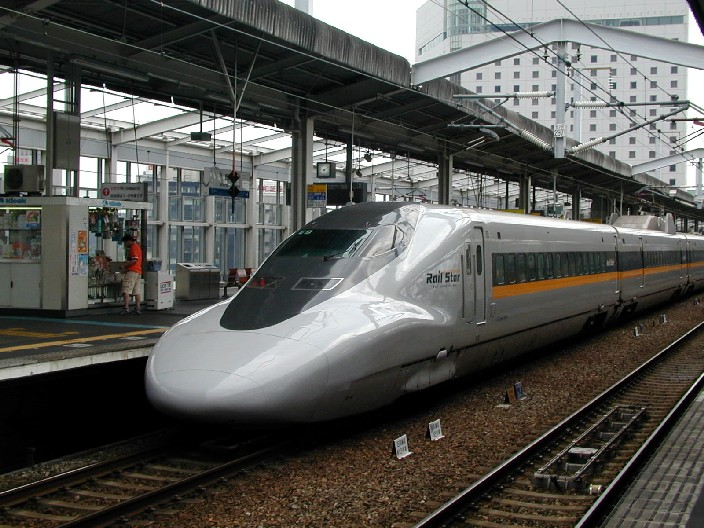 イタリア語版からのコピー